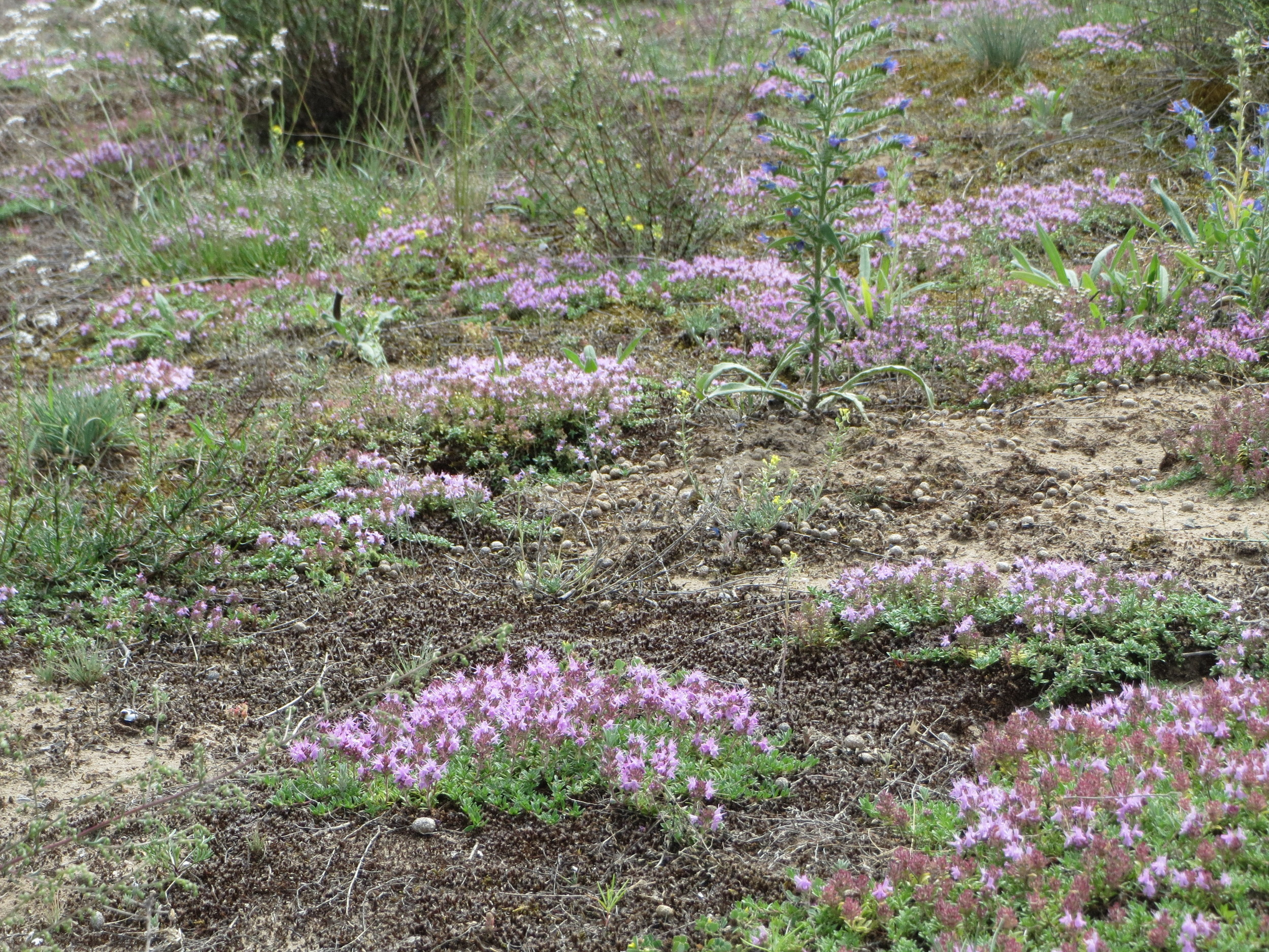 Sand-Thymian (Thymus serpyllum) im Mainzer Sand